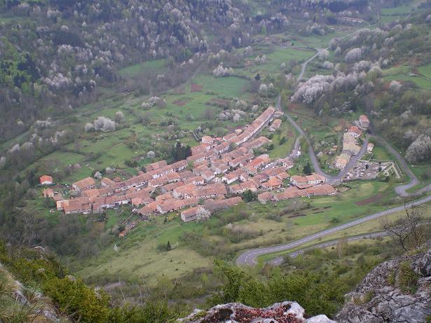 Montsegur vist des del castell